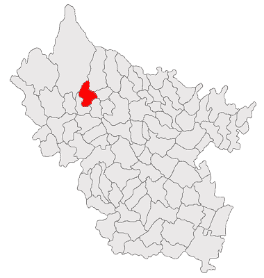 Categorie:Hărţi ale judeţului Buzău